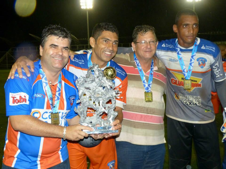 O ex-prefeito de Duque de Caxias, Washington Reis, segurando a taça com jogadores, comissão técnica e o presidente Luiz Carlos Arêas.